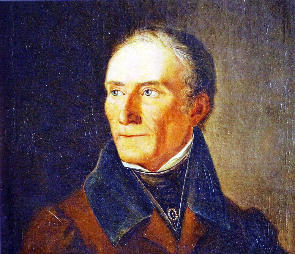 Maximilian Freiherr Droste zu Vischering-Padberg (Vater)